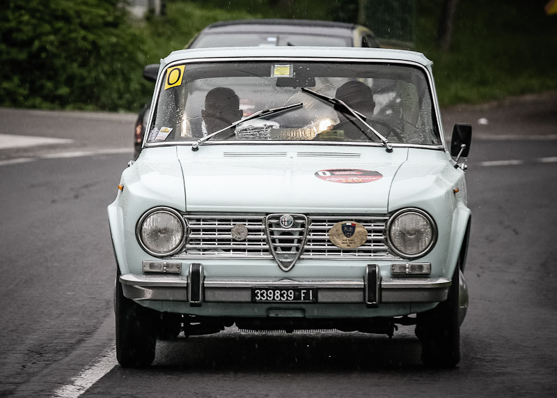 1000 miglia 2012 - SS della Futa . Pianoro (BO)